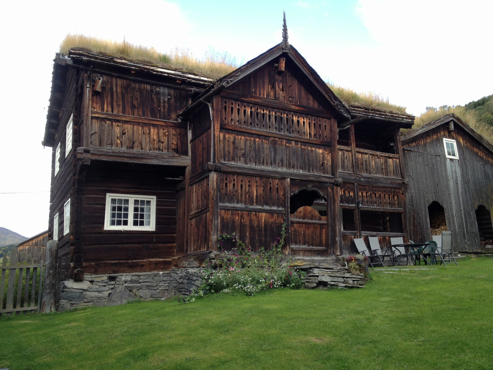 Nørdre stu på gården Søre Harildstad i Heidal, Sel. Gården er totalfredet